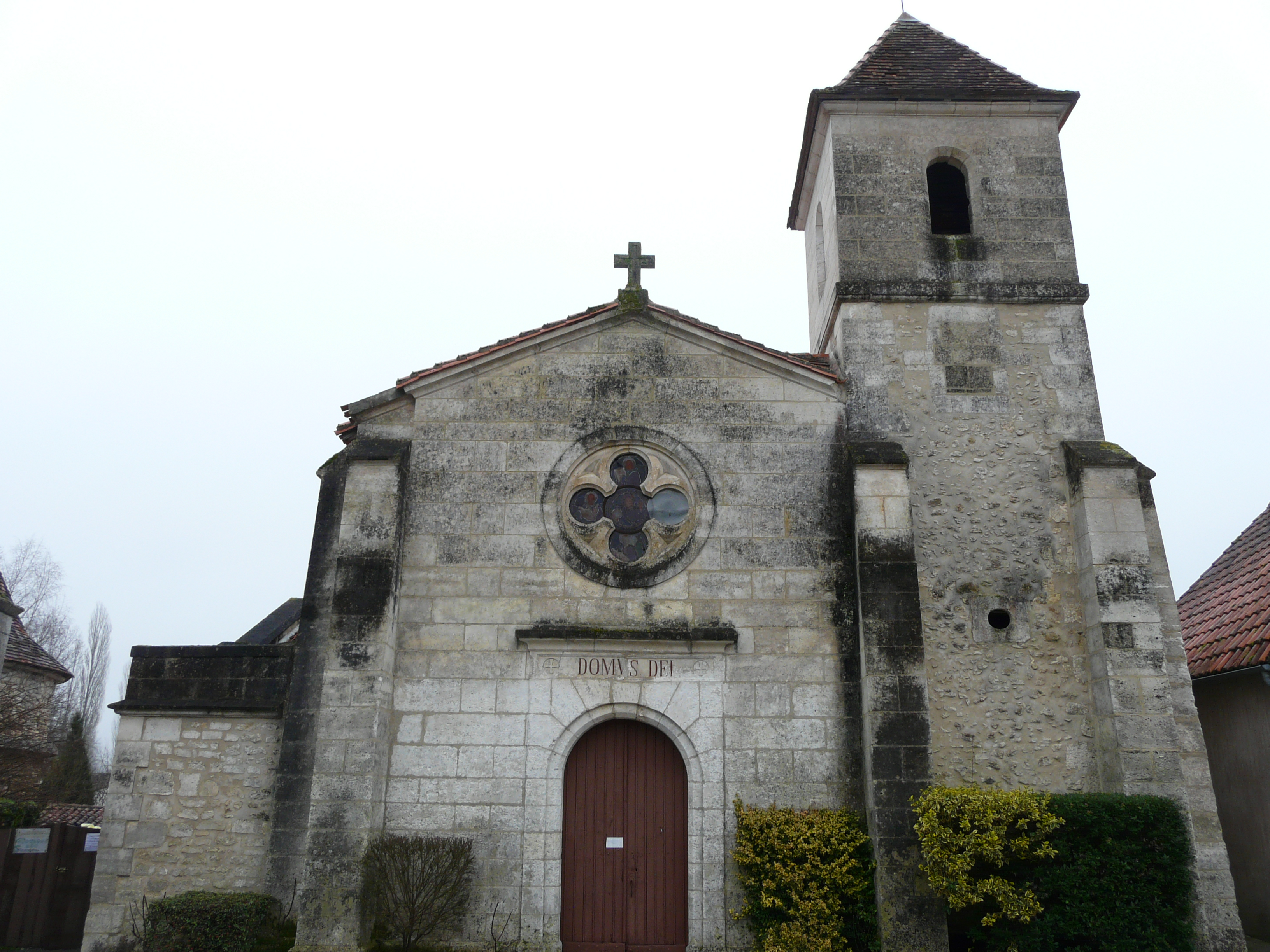 L'église Saint-Astier, Chapdeuil, Dordogne, France.